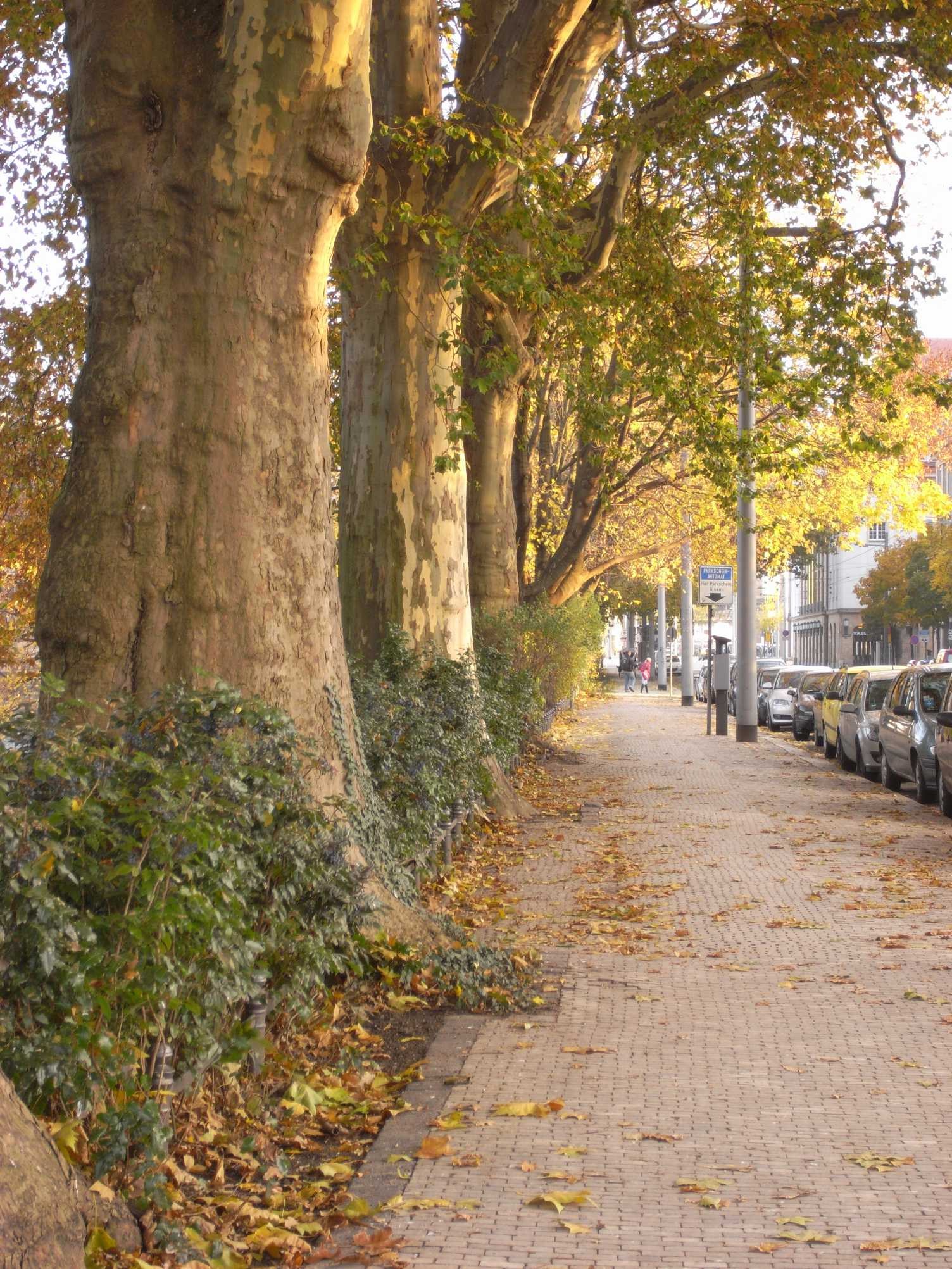 Ostra-Allee in Dresden, am Zwinger (Sachsen, Deutschland)